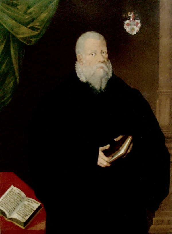 Ludwig Helmbold auf einem alten Ölgemälde im Chor von Divi Blasii in Mühlhausen/Thüringen